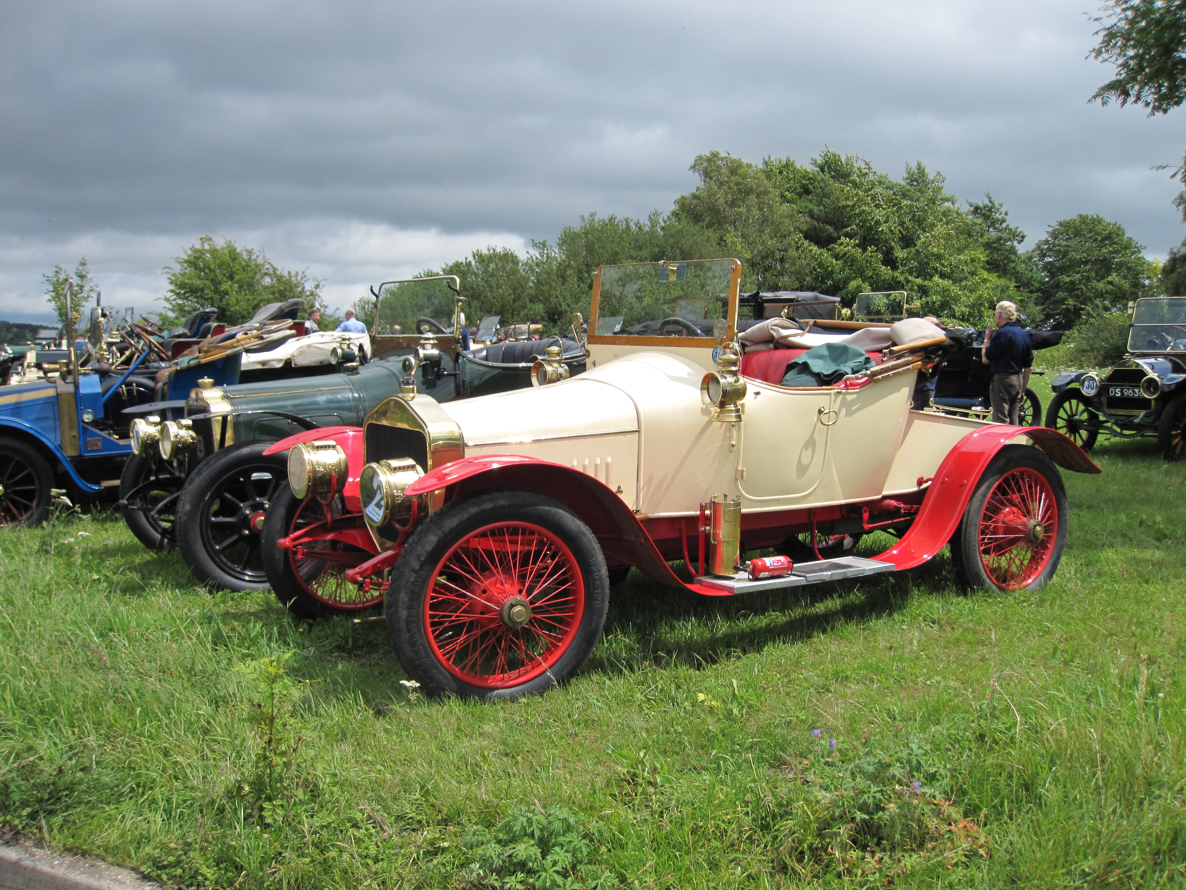 1912 Straker-Squire 15HP